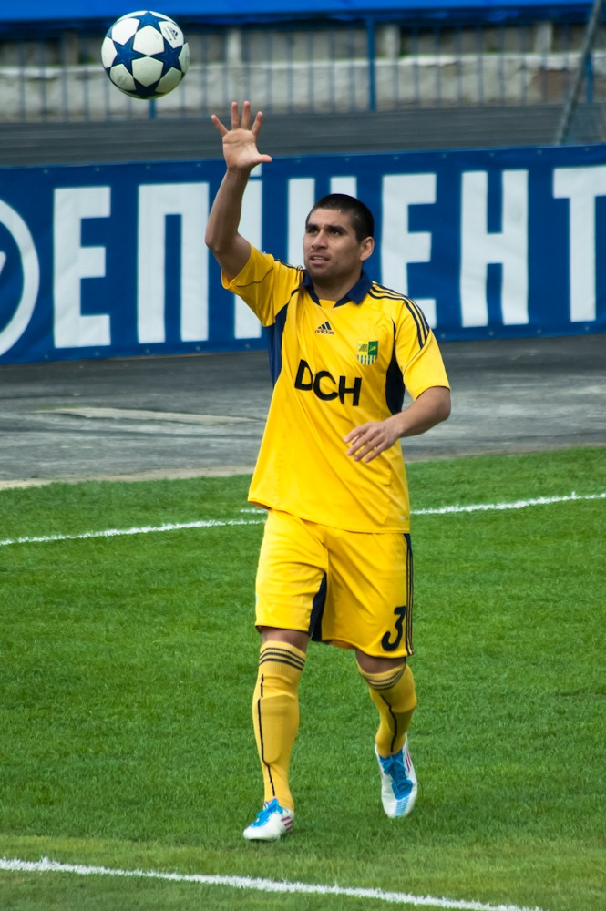 Кристиан Карлос Вильягра — аргентинский футболист.